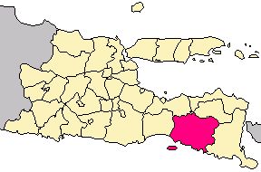 carte indonésienne